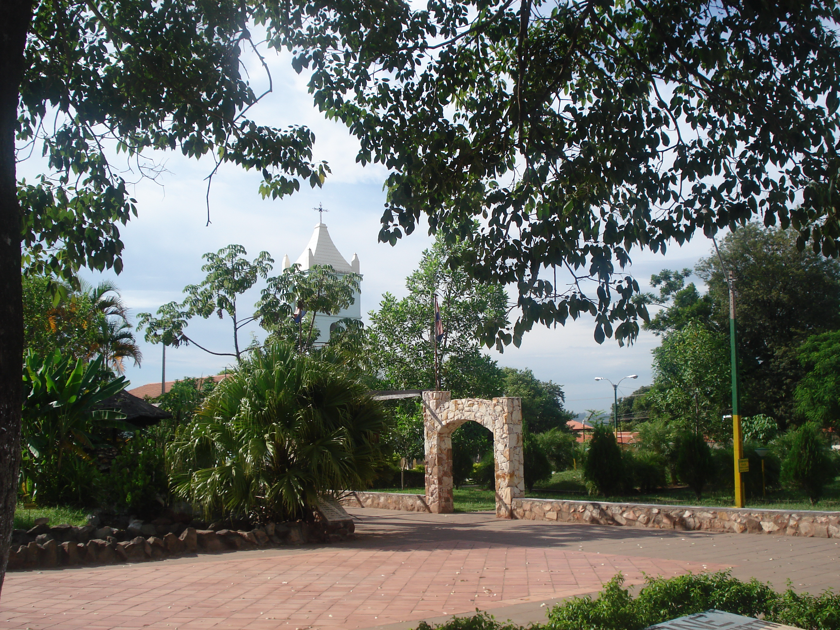 Plaza e iglesia de la Ciudad de Ypane